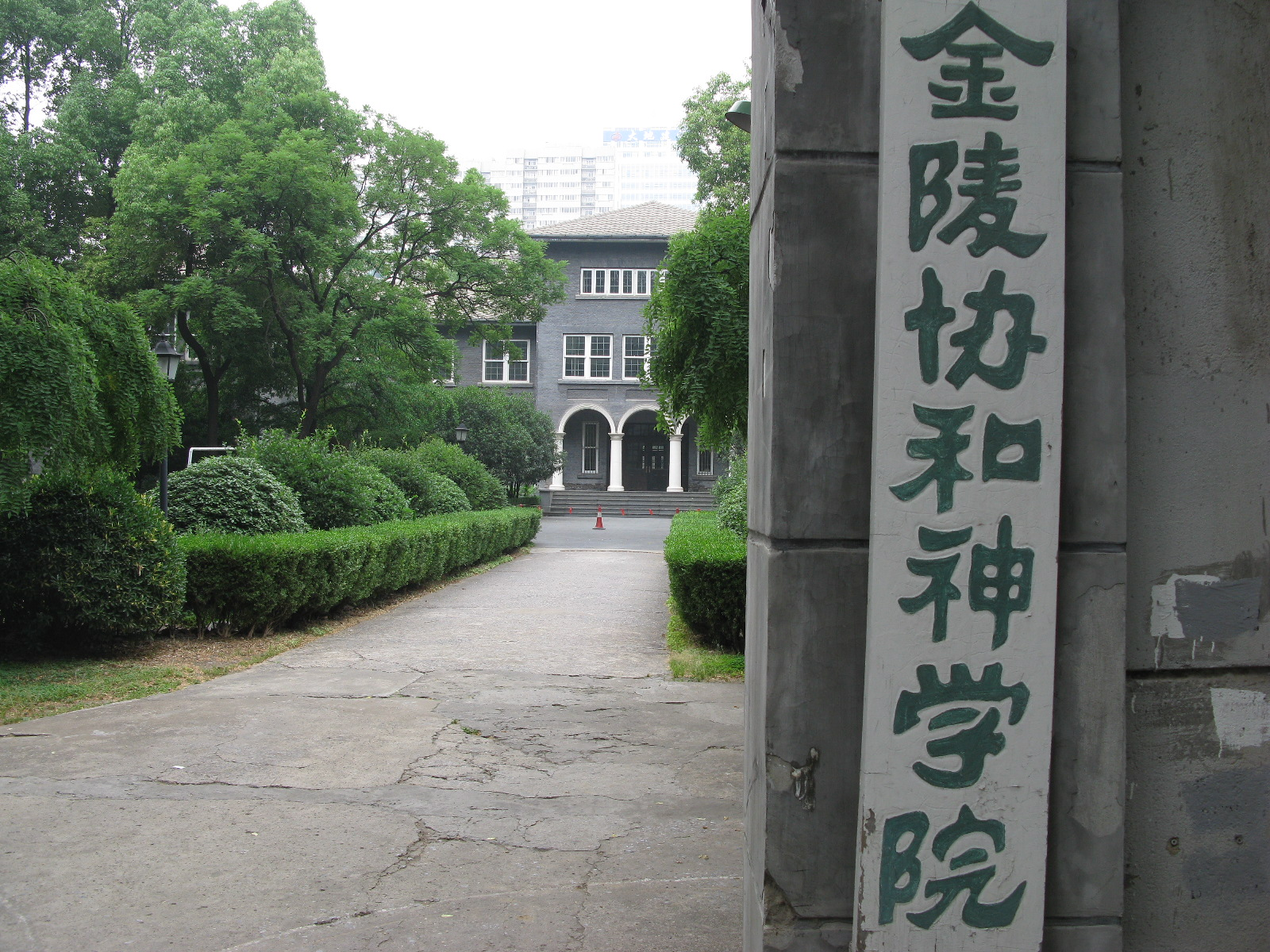 Collaisde